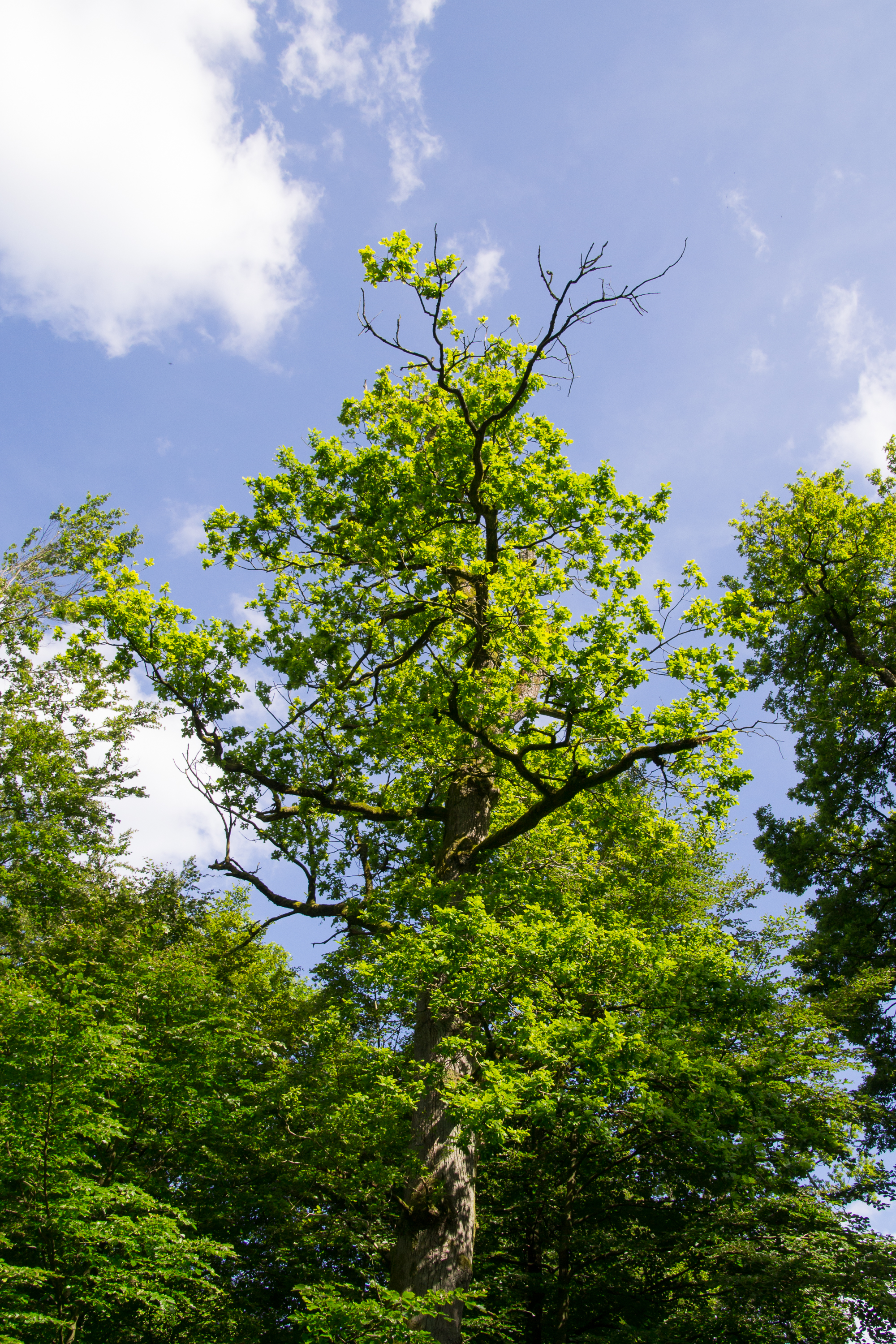 Augustdorf, Naturschutzgebiet "Östlicher Teutoburger Wald", Stieleiche (Quercus robur)